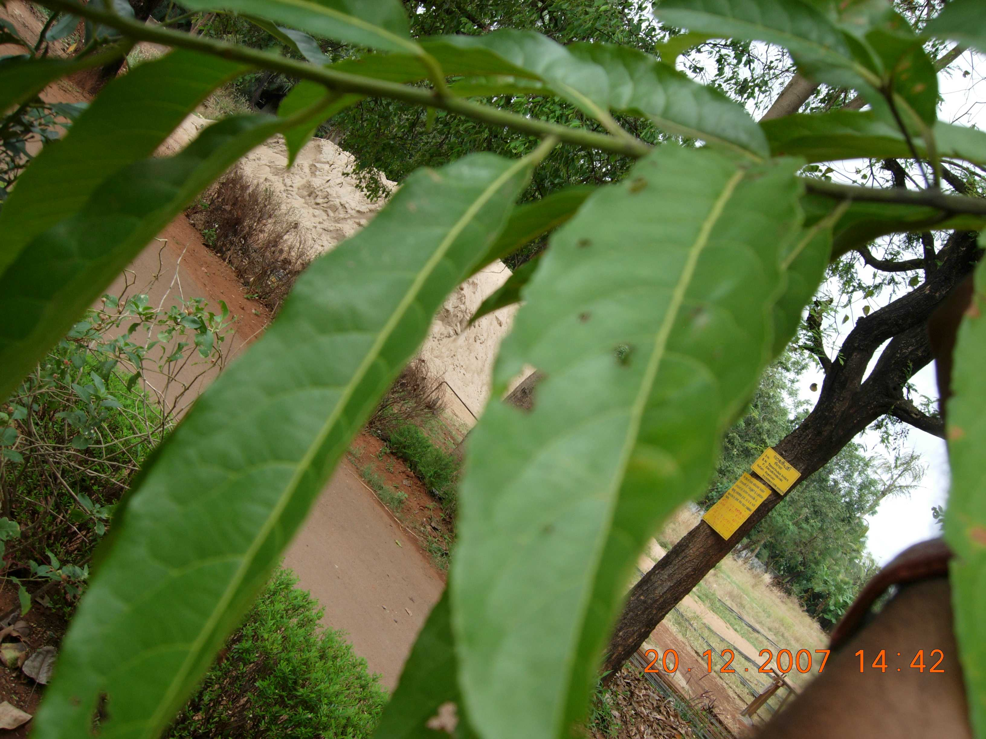 Rudraaksham